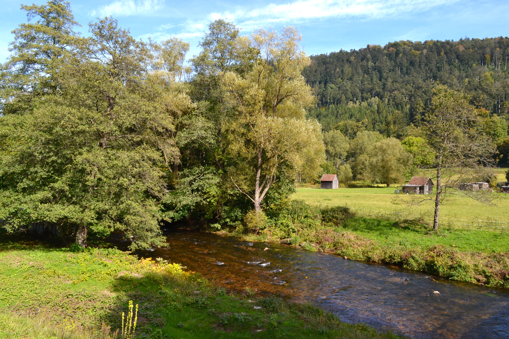 Enz, Eyachbrücke